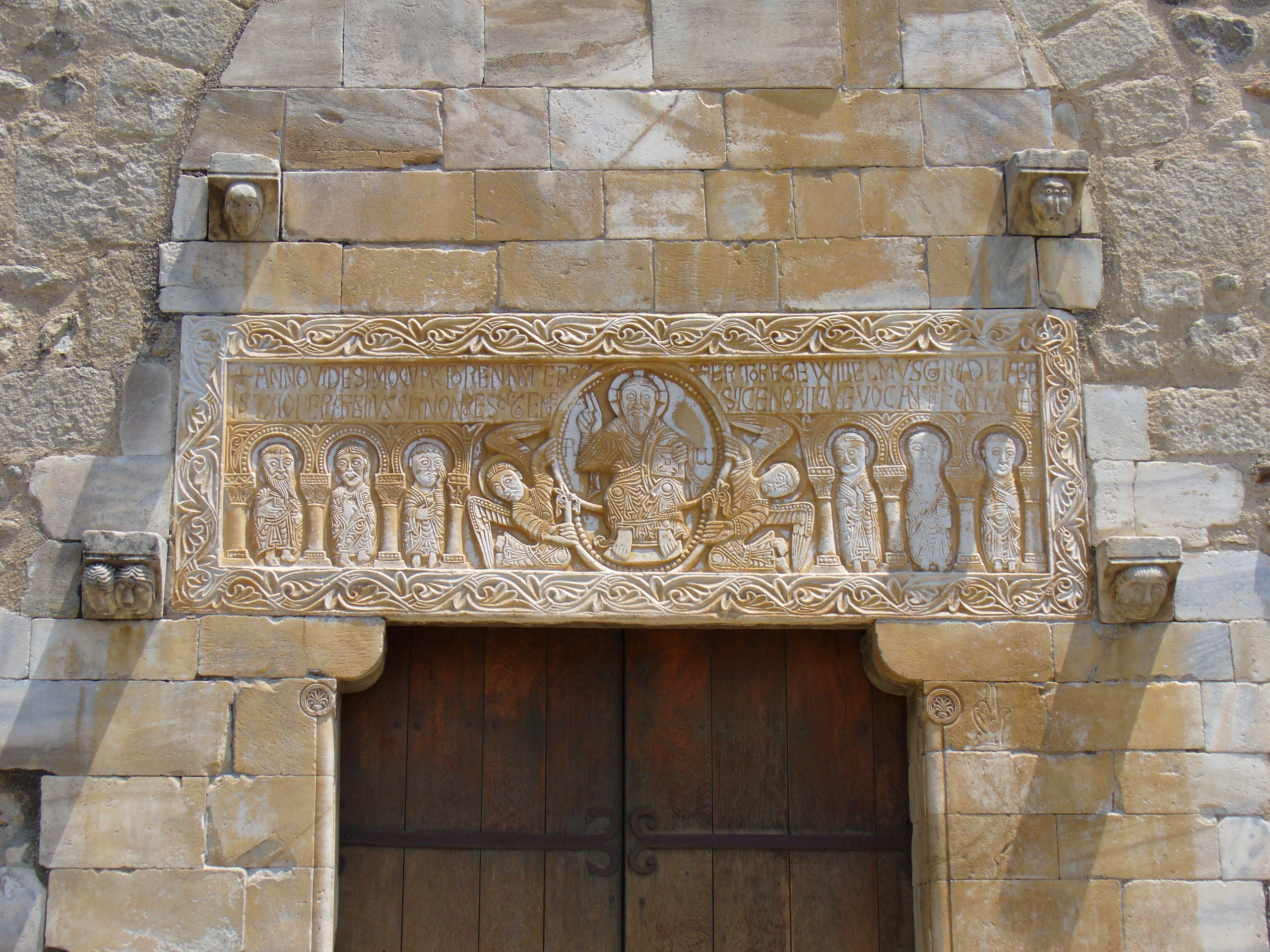 Türsturz an der Abteikirche St.Michel